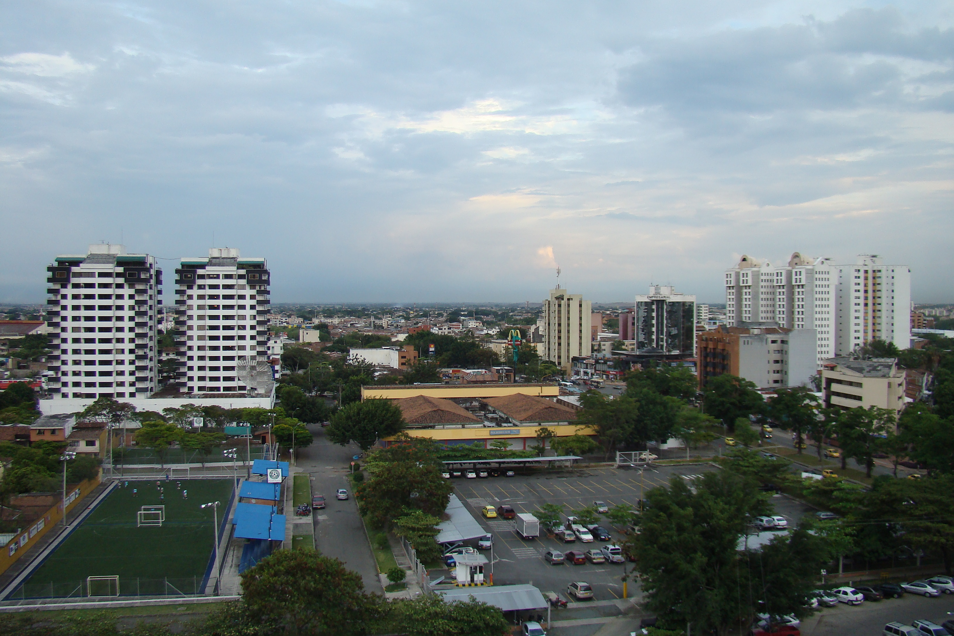 Comuna 19 de Cali, Colombia